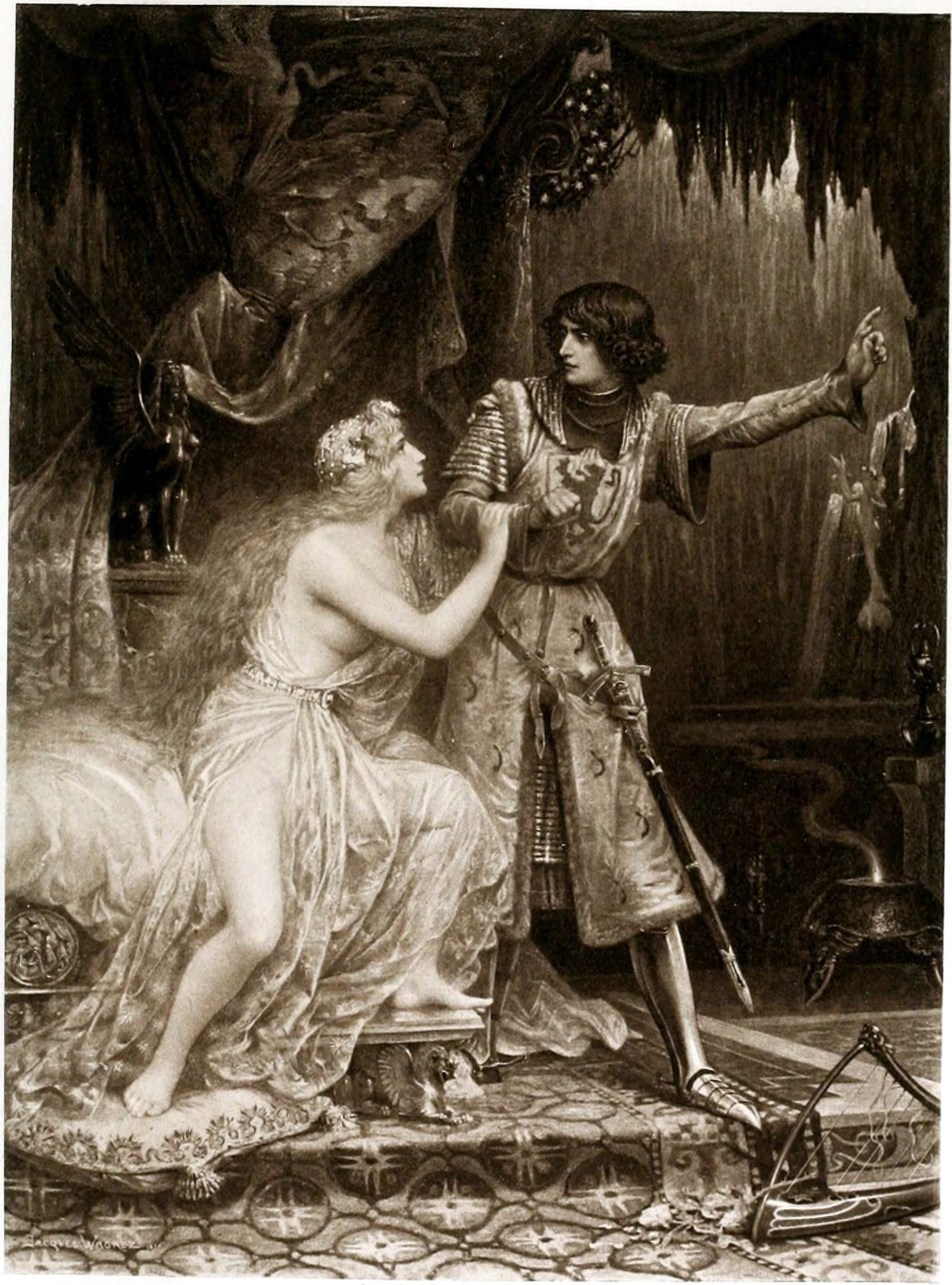 Tannhauser dans le Venusberg